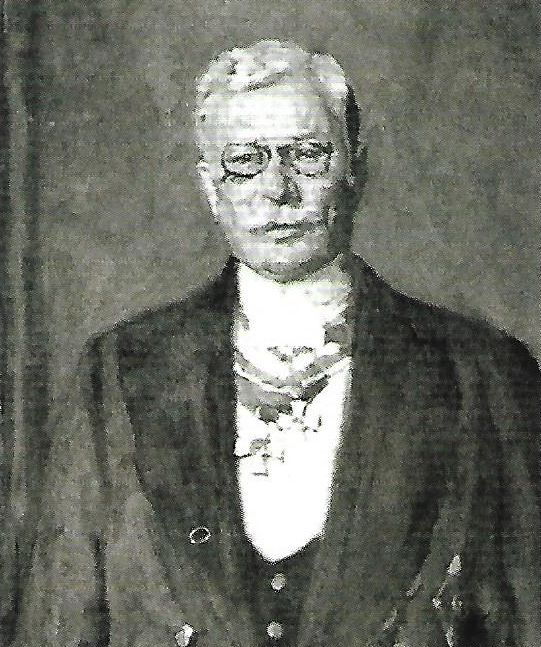 Ludwig von Renvers (1855-1936)